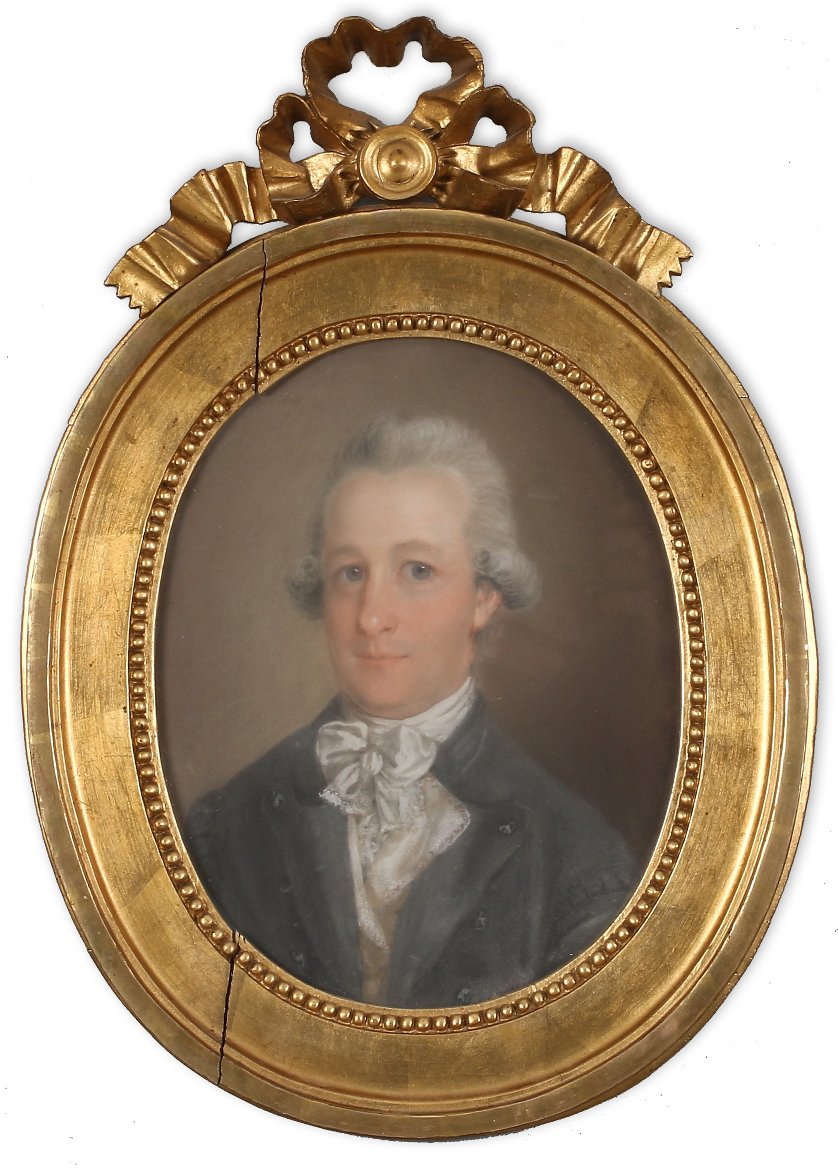 Porträtt av häradshövding Joackim Morsing (1767-1798), iklädd en variant av den nationella dräkten. Porträtt från ca 1795.